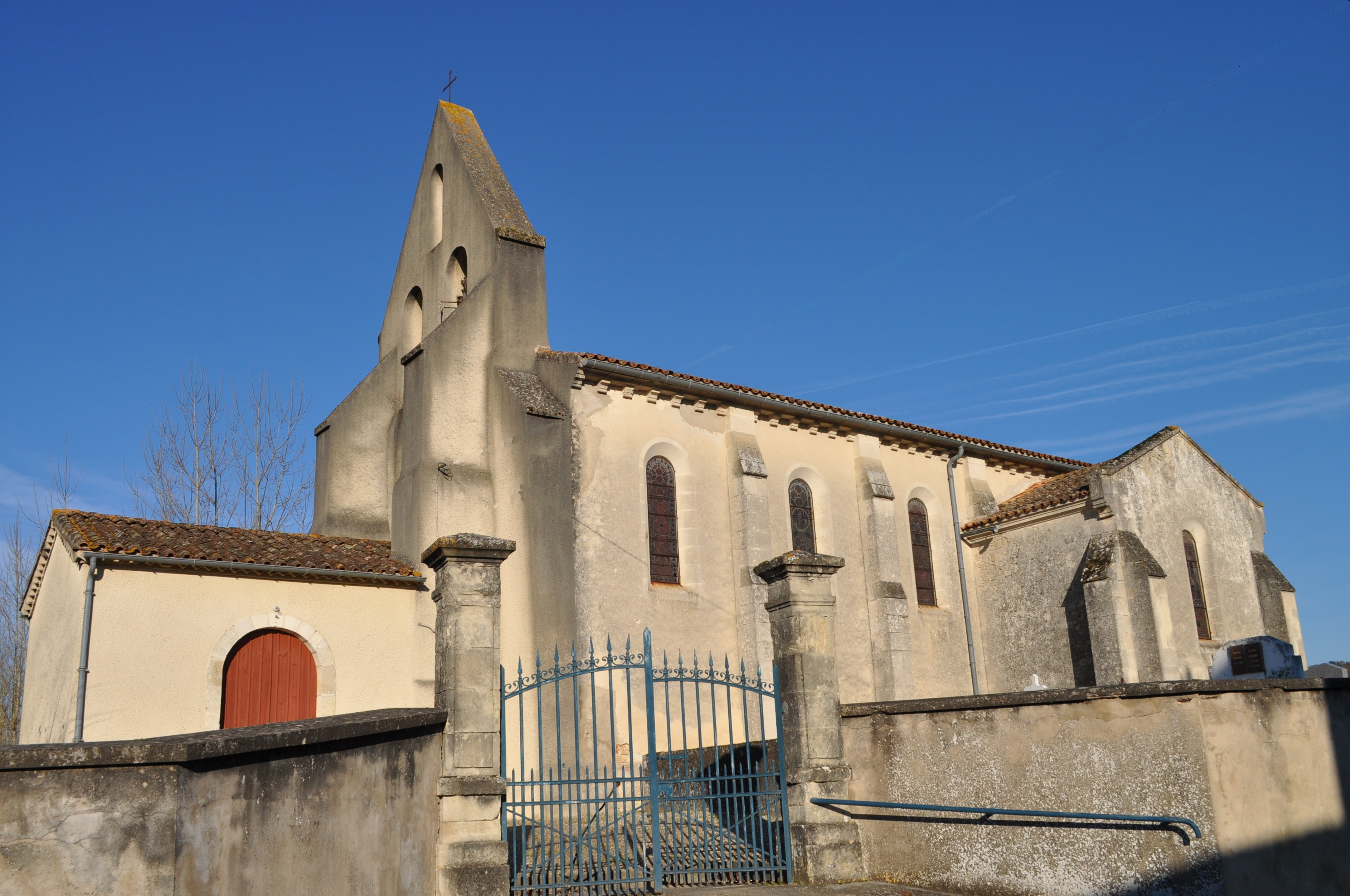 Église Église Saint-Caprais de Grézet à Grezet-Cavagnan (Lot-et-Garonne, France)